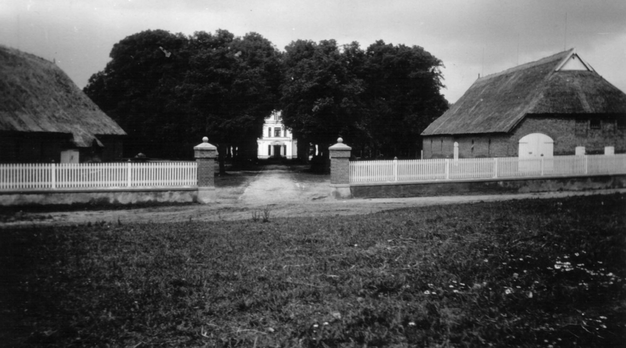 Rittergut Dolgen um 1900 Datum: um 1900 Urheber: Ida von Plessen, geb. von Zülow, vormals Dolgen Quelle: privates Fotoarchiv der Familie Pfeiffer, Köln Hinweis: das Foto stammt aus dem Nachlass meiner Urgroßmutter Ida von Plessen und befindet sich im Original in meinem privaten Fotoarchiv